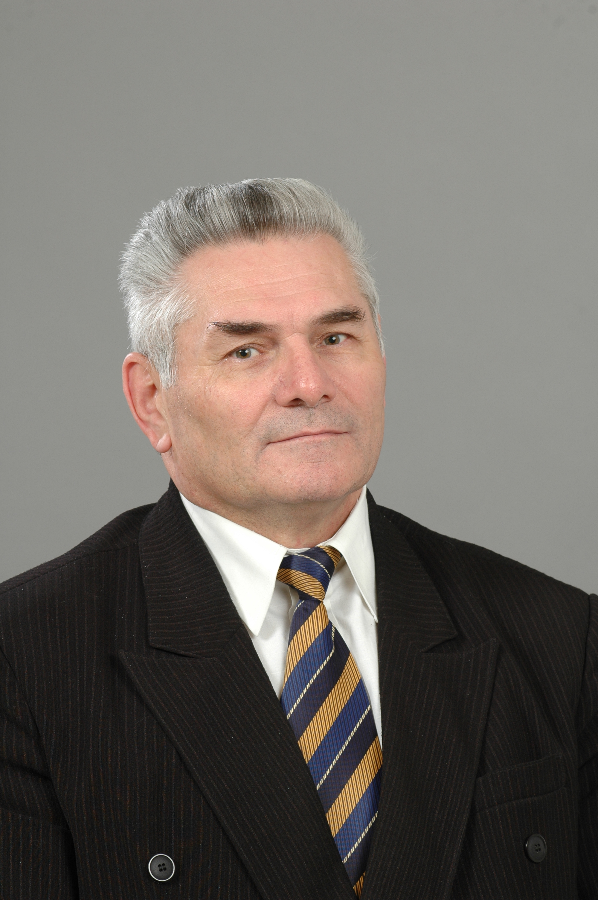 Foto: Saeima